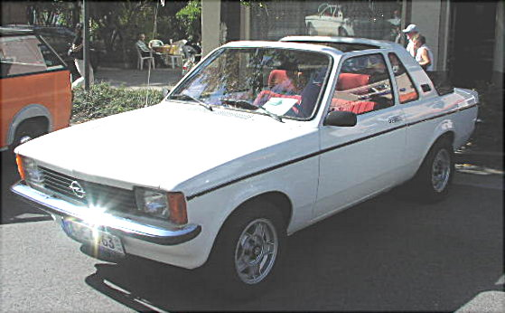 Opel Kadett C 1.2 Aero